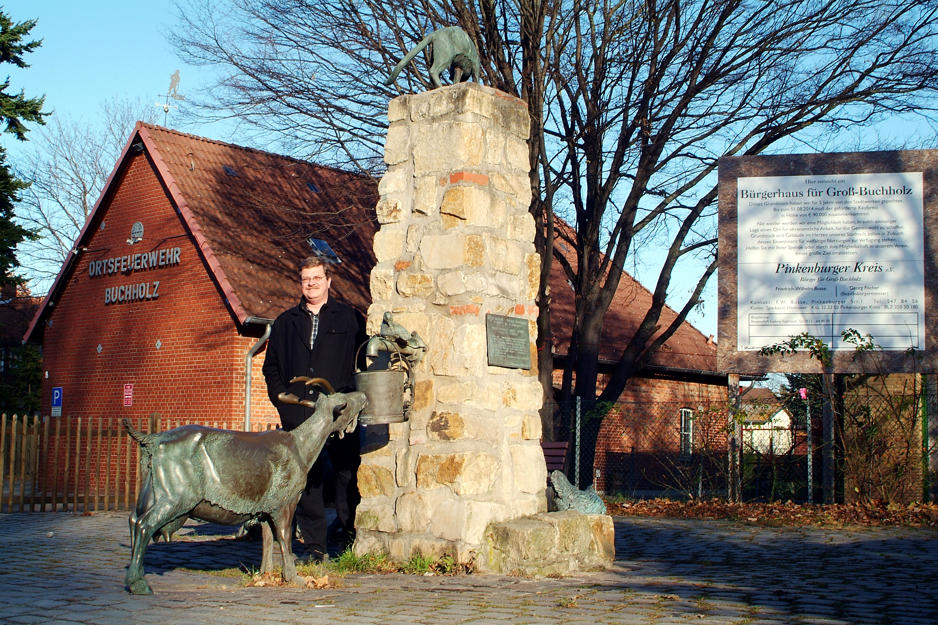 Dorfbrunnen in der Pinkenburger Straße, Teilansicht mit Friedrich-Wilhelm Busse, dem Gründer des Pinkenburger Kreises. Im Hintergrund links ein Gebäude der Ortsfeuerwehr Buchholz, rechts eine Infotafel zwecks Geldsammlung für den Kauf eines neuen Bürgerhauses Groß-Buchholz.